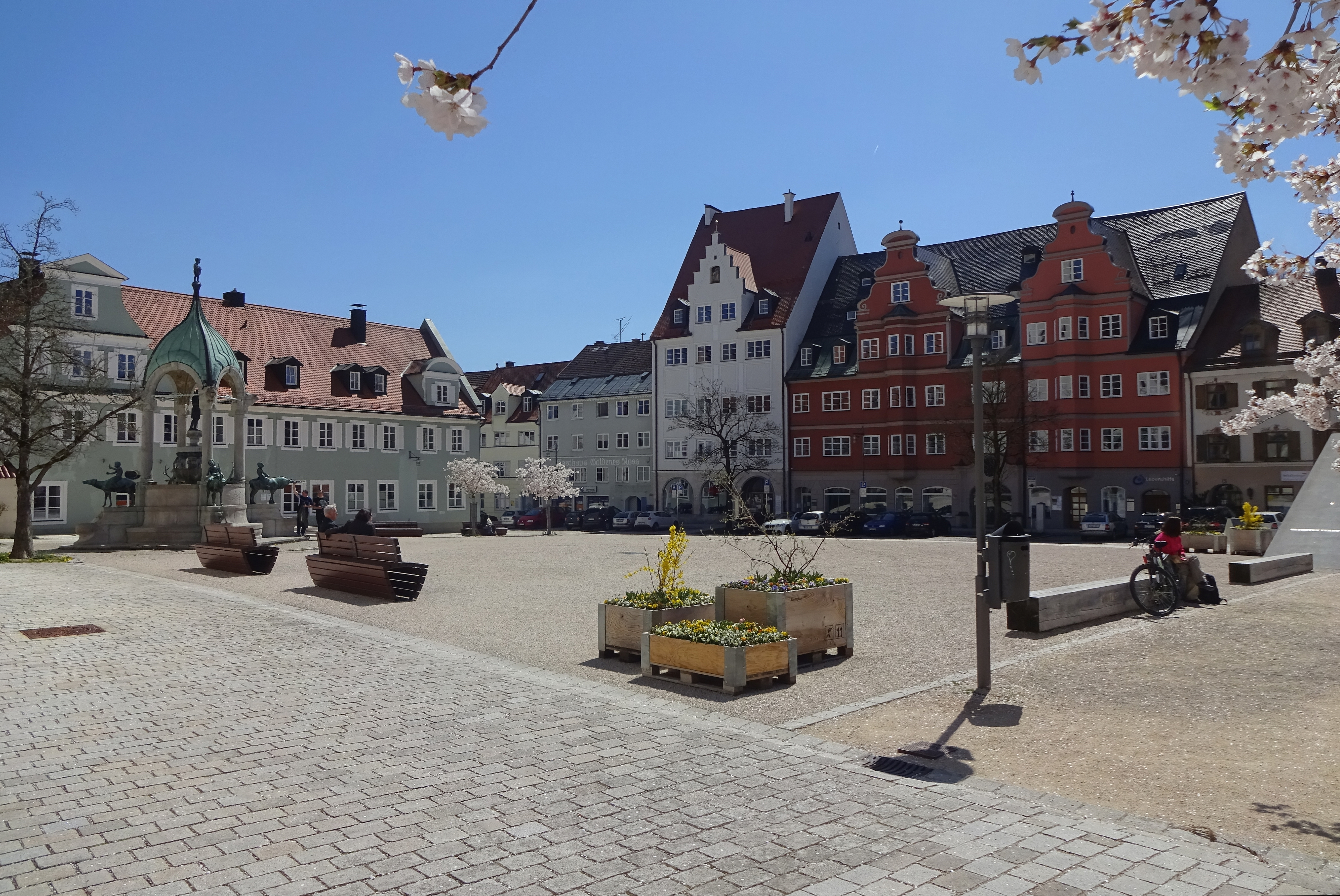 April 2015